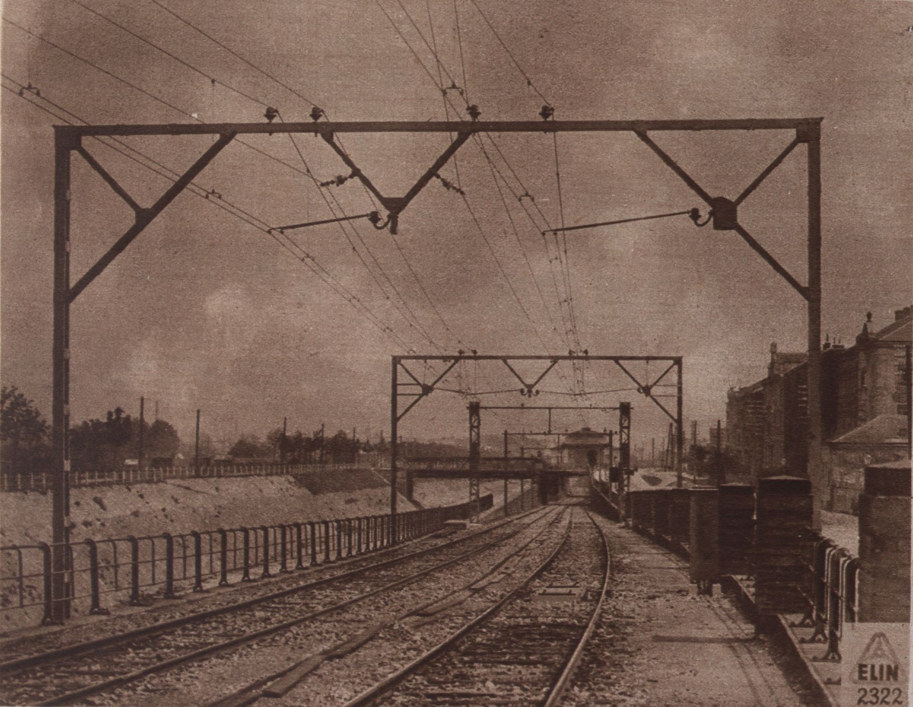 Wiener elektrische Stadtbahn